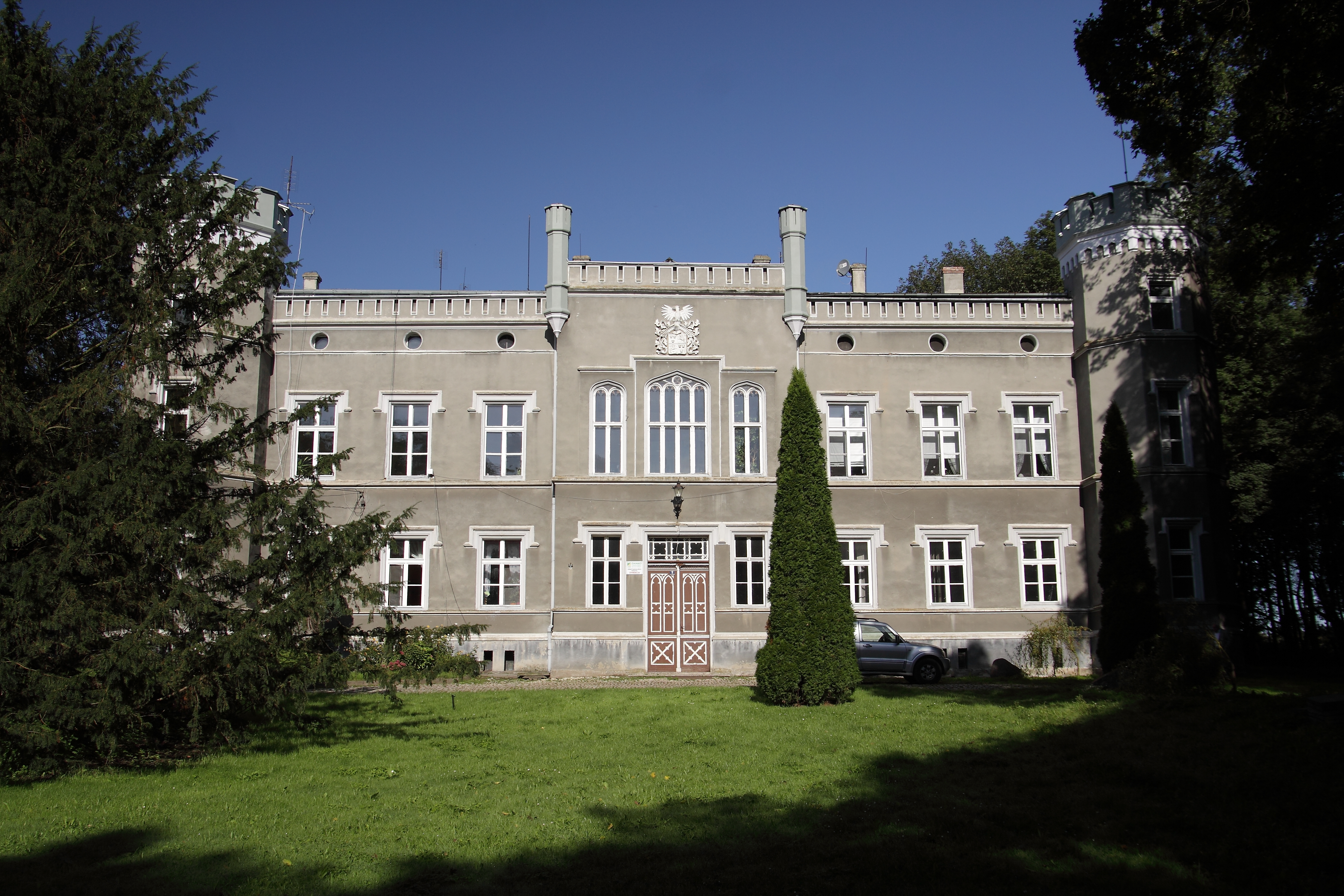 Modzurów, pałac, 1864